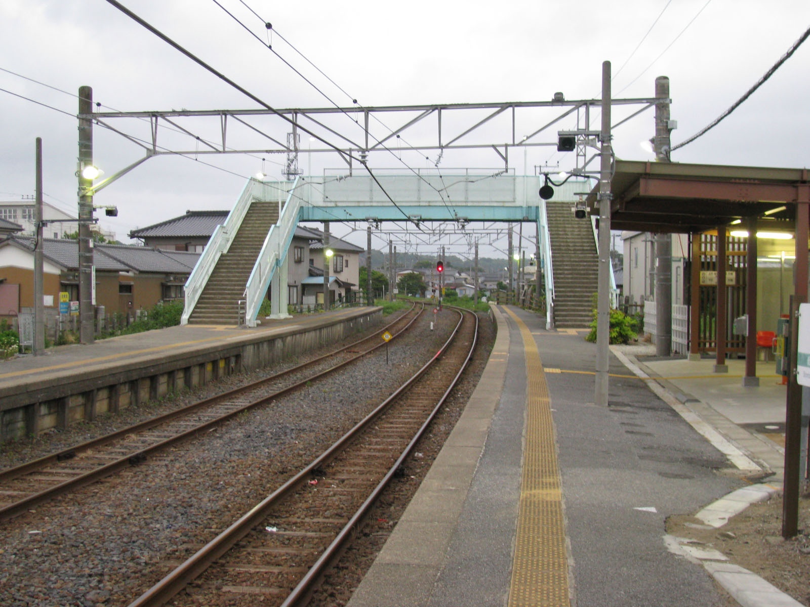 JR成田線椎柴駅